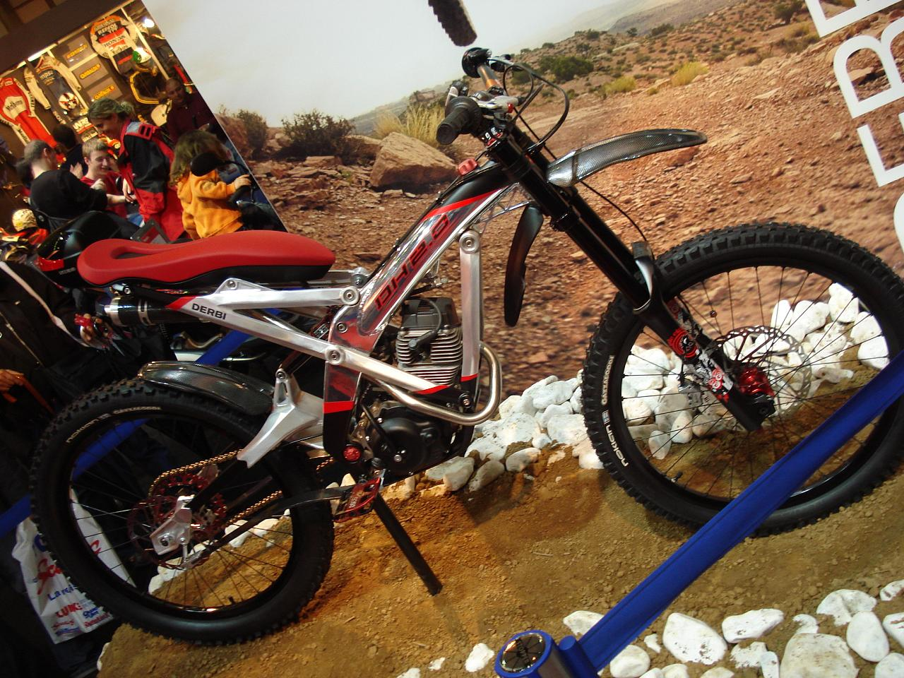 Motoh! Barcelona Maig 2008 Derbi DH2.0